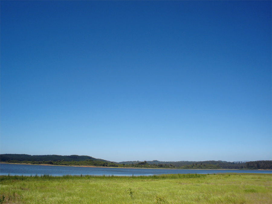 junta Valparaíso, Lago Peñuelas